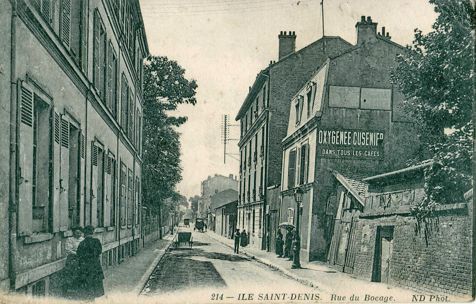 Carte postale ancienne éditée par ND, n°214 :ÎLE-SAINT-DENIS - Rue du Bocage